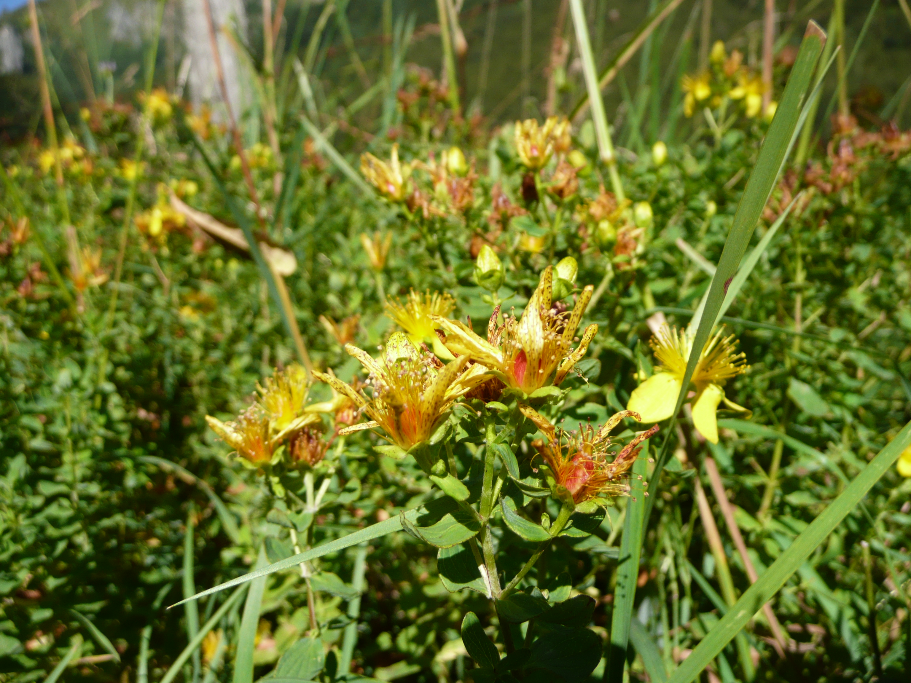 Millepertuis à quatre angles (Hypericum tetrapterum) dans la Réserve naturelle de la vallée de Chaudefour. Plante identifiée par le Conservateur de la réserve, Eric Vallet, lors d'une visite organisée d'une journée dans la reserve. Map: 45° 32' 11" N 02° 51' 10" E